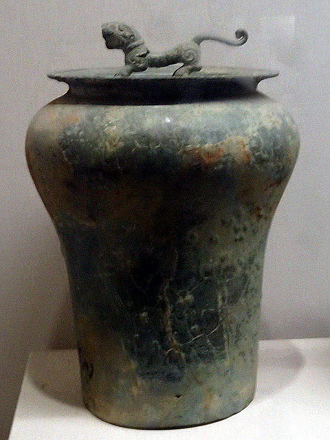 战国虎钮铜錞于，出土于陕西省安康市出土，现藏于陕西历史博物馆